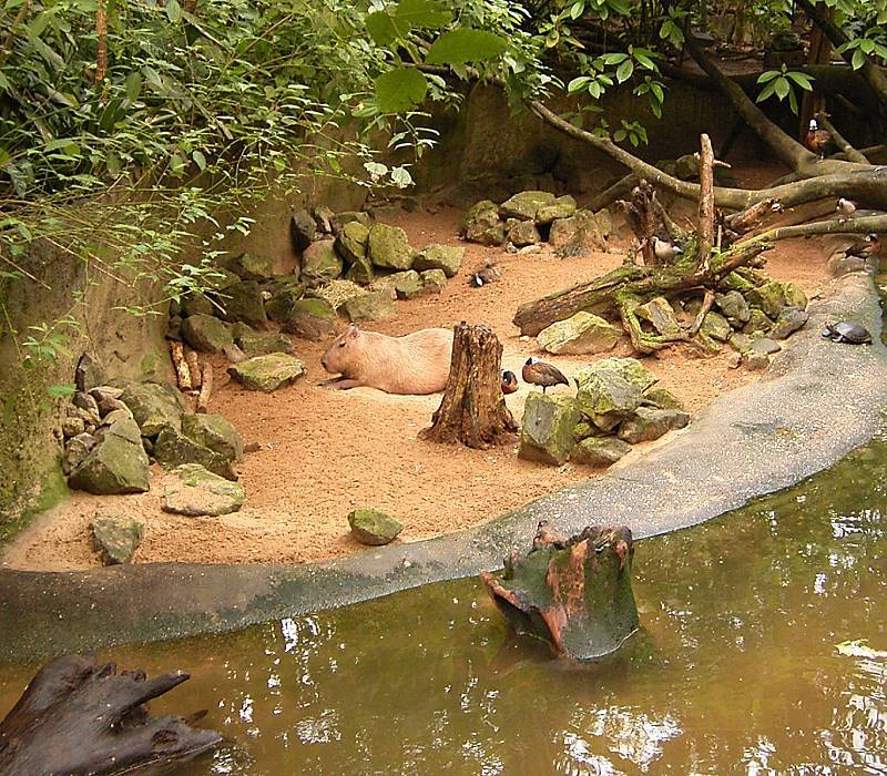 Hydrochoerus hydrochaeris Capybara - Burgers Zoo, NL